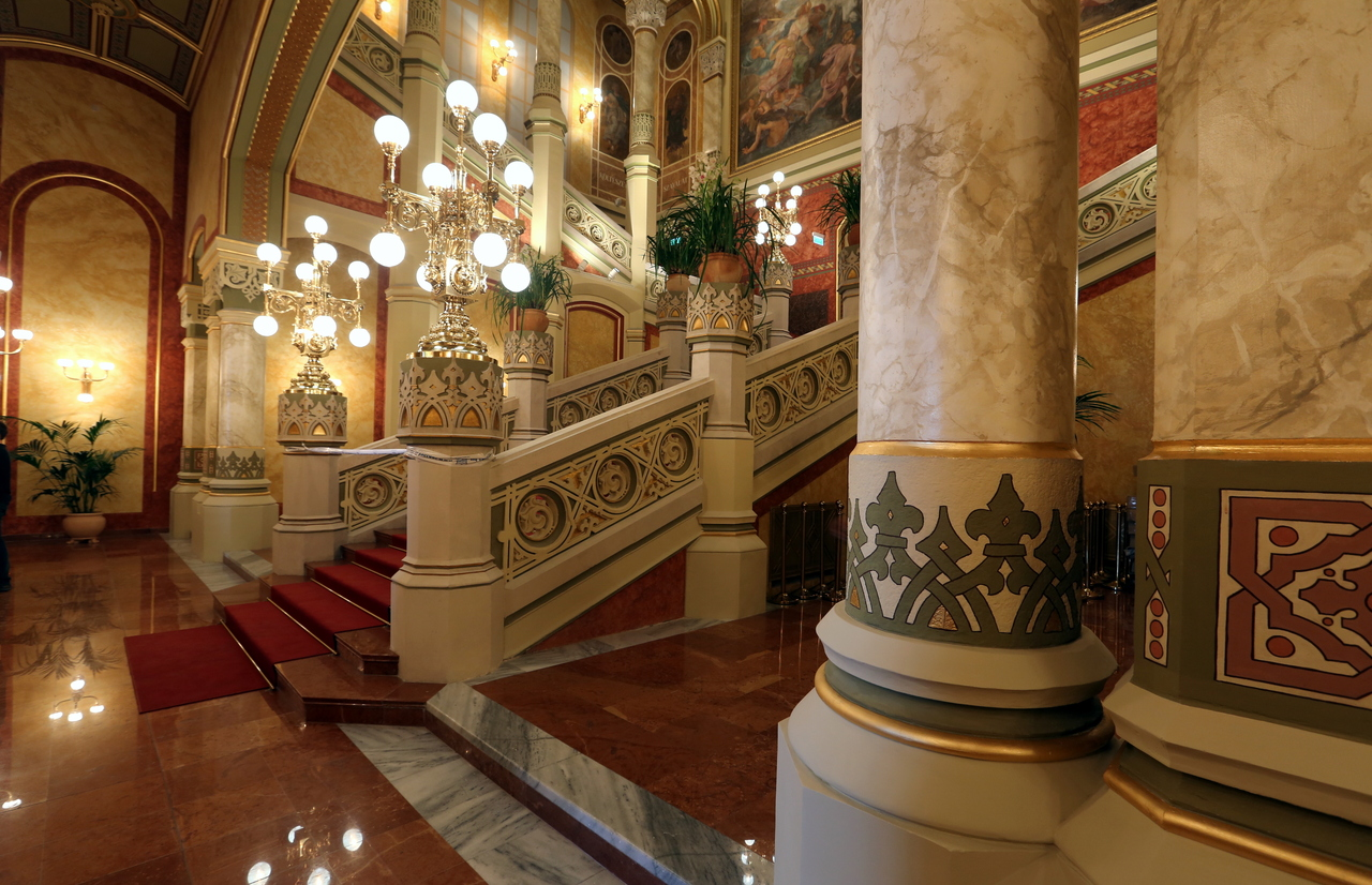 Pesti Vigadó